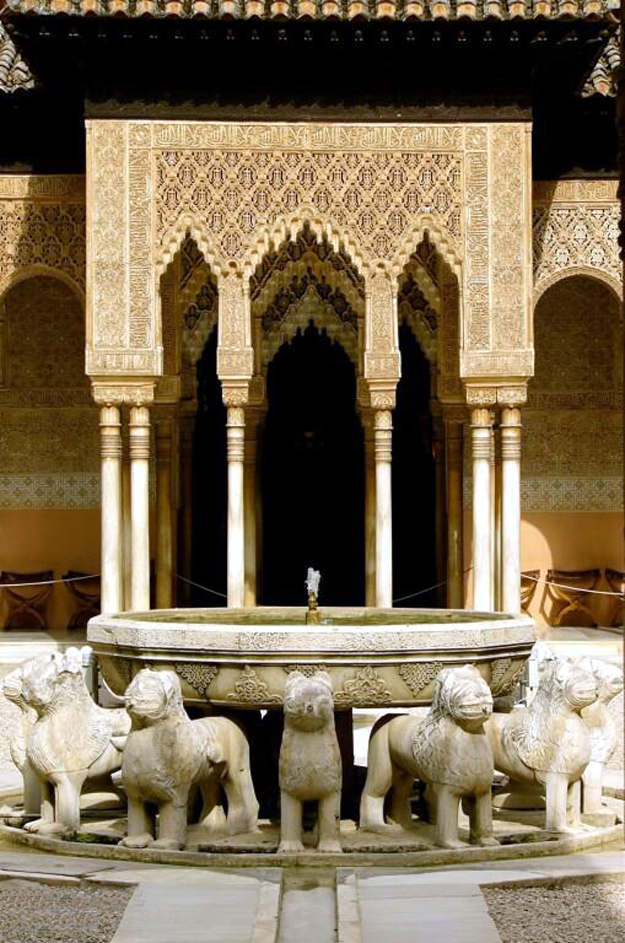 Patio de los Leones. Alhambra. Granada, España.